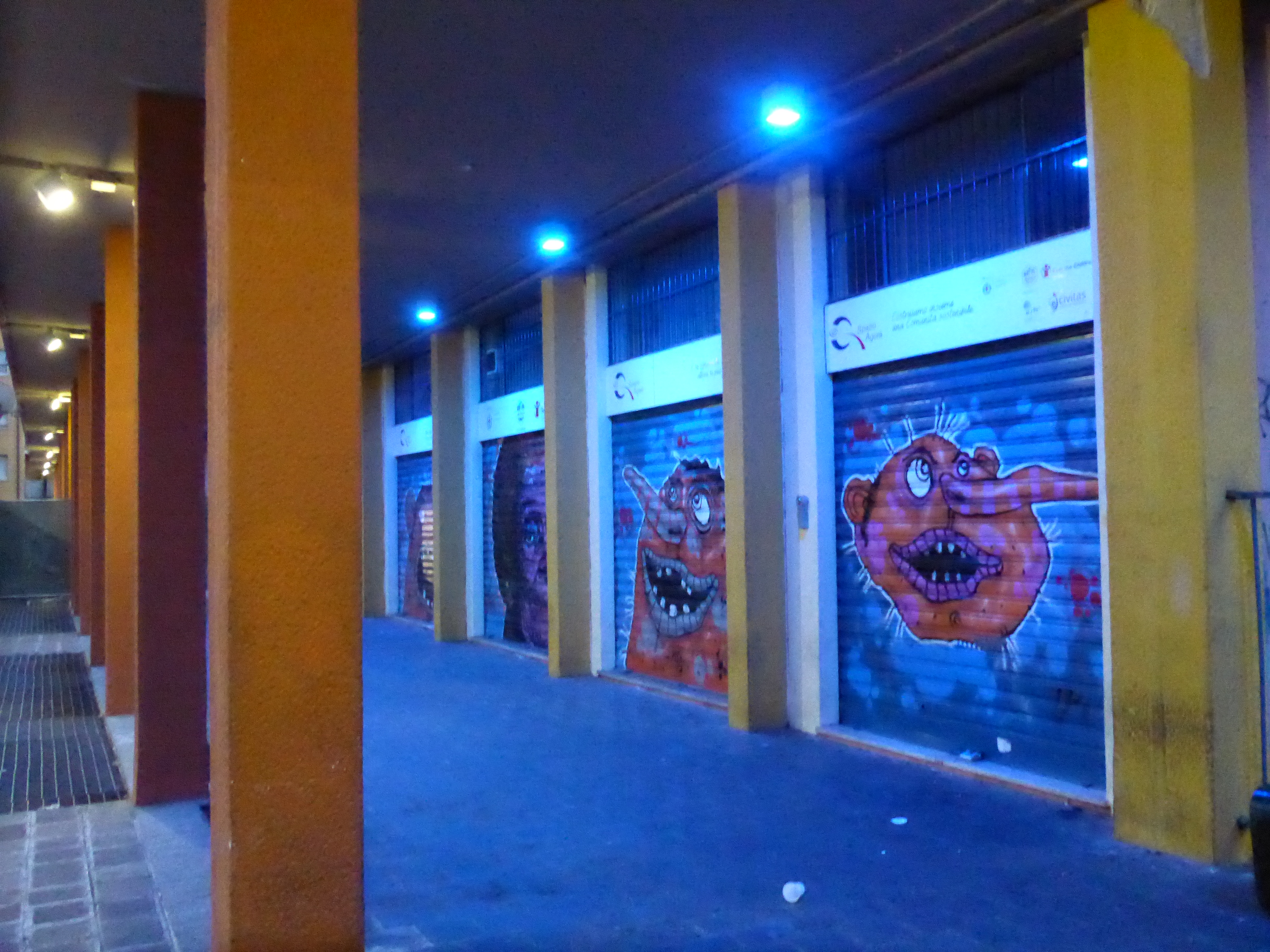 Quarto Oggiaro, Milano.